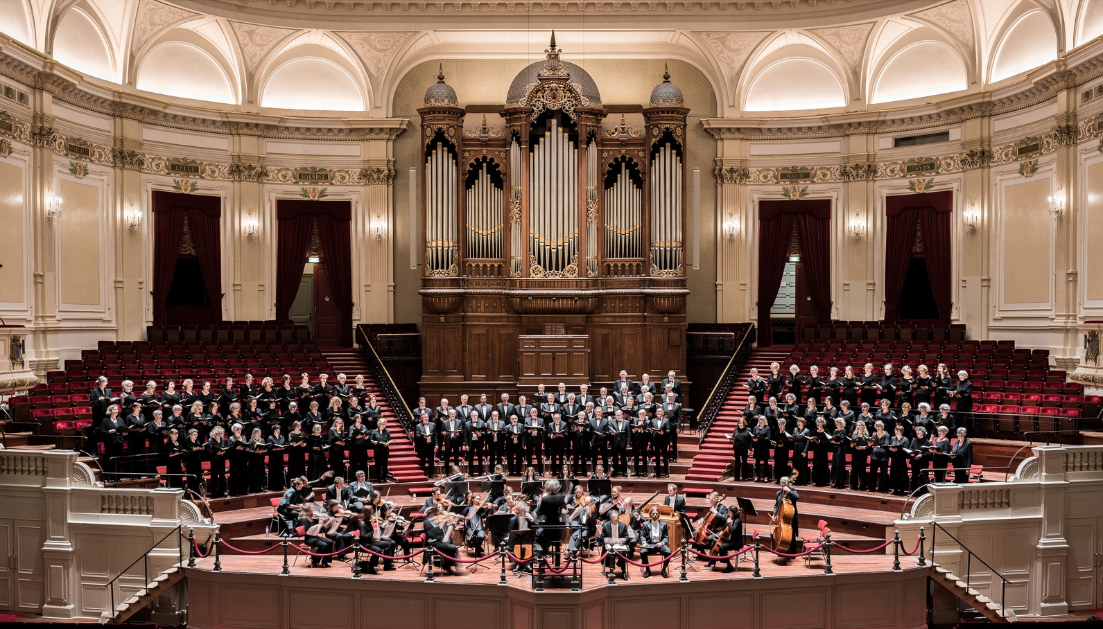 KCOVAmsterdam bij de uitvoering van de Mattäus Passion in het Concertgebouw Amsterdam 2017